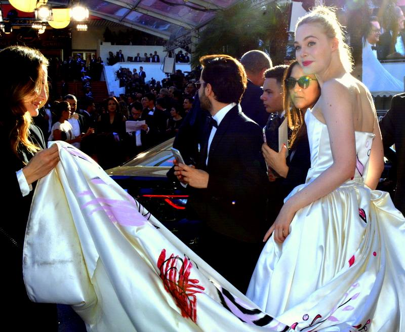 Elle Fanning au festival de Cannes